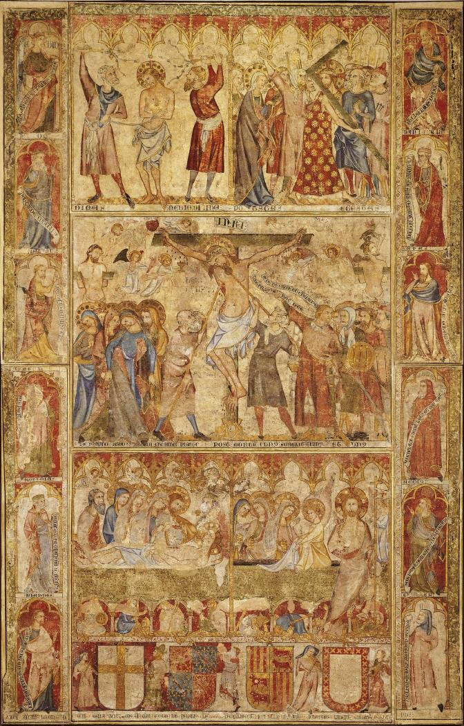 Escenas de la Pasión de Cristo. 1335. Pintura mural al temple pasada a lienzo procedente del refectorio de la Catedral de Pamplona. Museo de Navarra. Inscripción: ANNO : D(OMI)NI : M:CCC:XXX : EVO DOMINUS: IO(H)AN(N)ES PETRI DE STELLA: ARCHDIACONUS S(AN)C(T)I PETRI DE OSUN: FUIT OPERARIUS E(C)CL(ES)IE B(E)ATE S(ANTCTE) M(ARIAE) PAMPIL(O)N(ENSIS): FEICIT FIEREI ISTUD REFERTORIU(M): ET IOHANNES OLIVERI DEPINXIT ISTUD OPUS. (Año del Señor mil trescientos treinta y cinco. Yo, don Juan Périz de Estella, archidiácono de San Pedro de Usún. Fue encargado de la iglesia de Santa María de Pamplona, hizo hacer este refectorio y Juan Olivier pintó esta obra.)